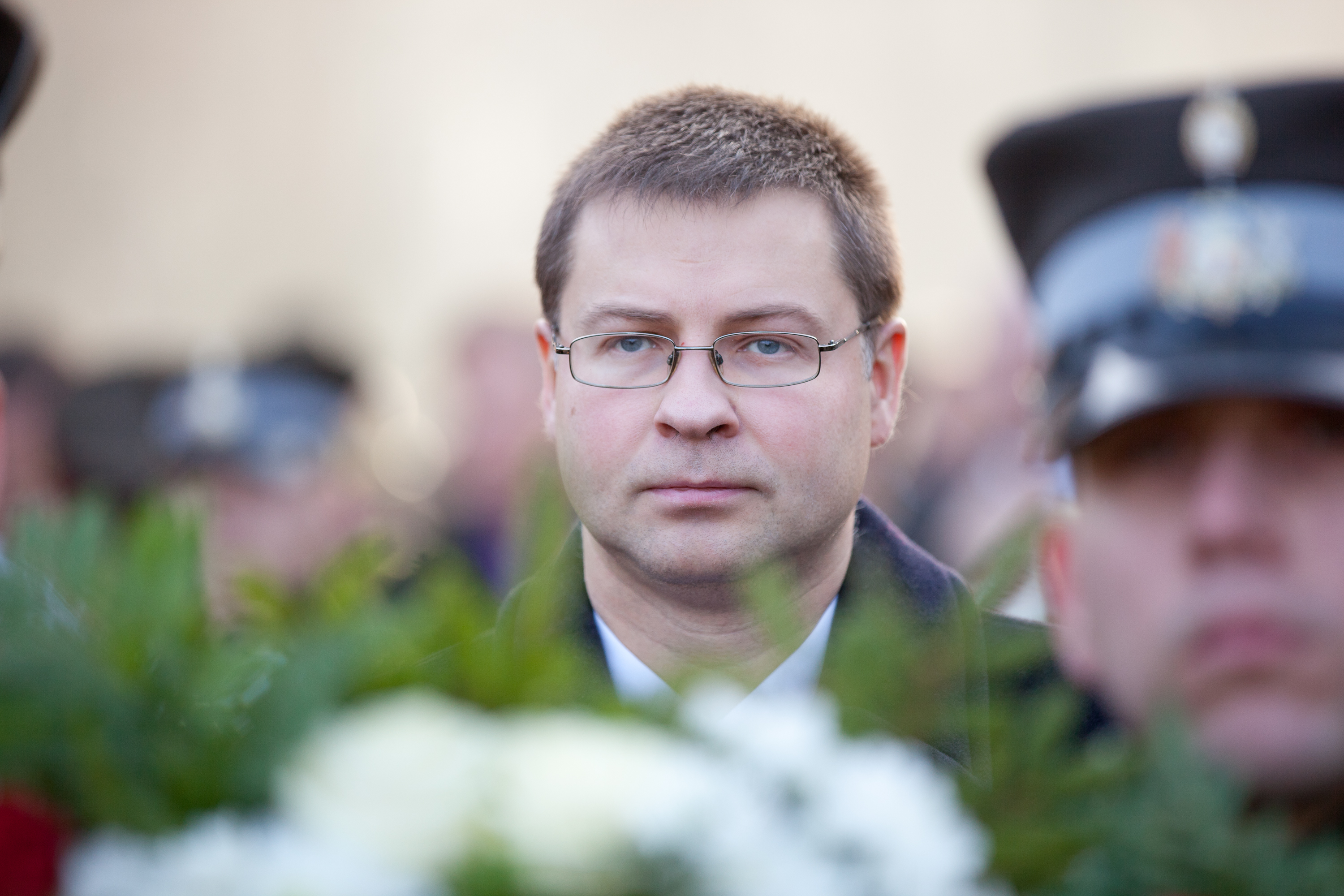 Foto: Toms Norde, Valsts kanceleja